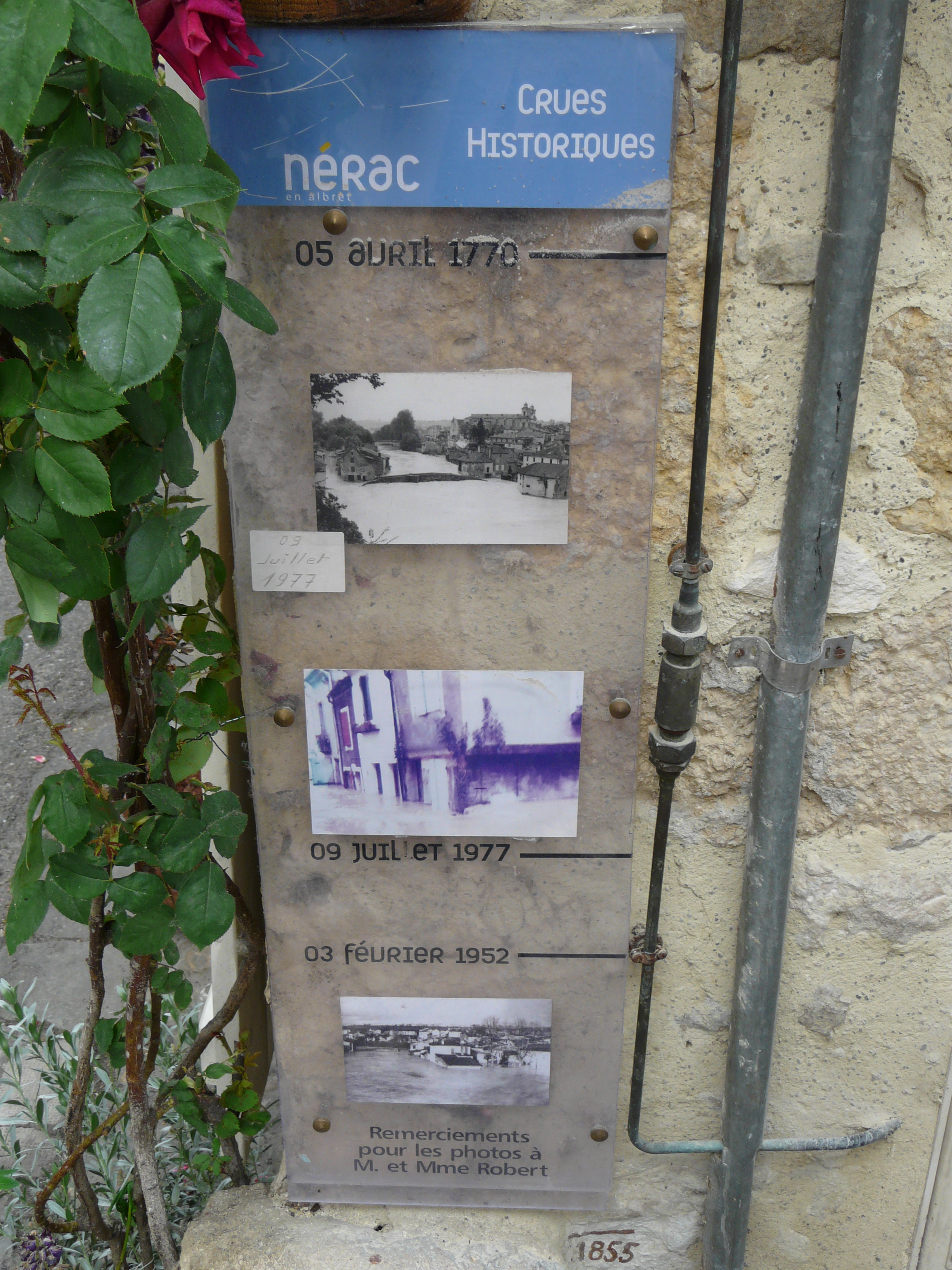 Témoins de crues, place des Tanneries, Nérac, Lot-et-Garonne, France.